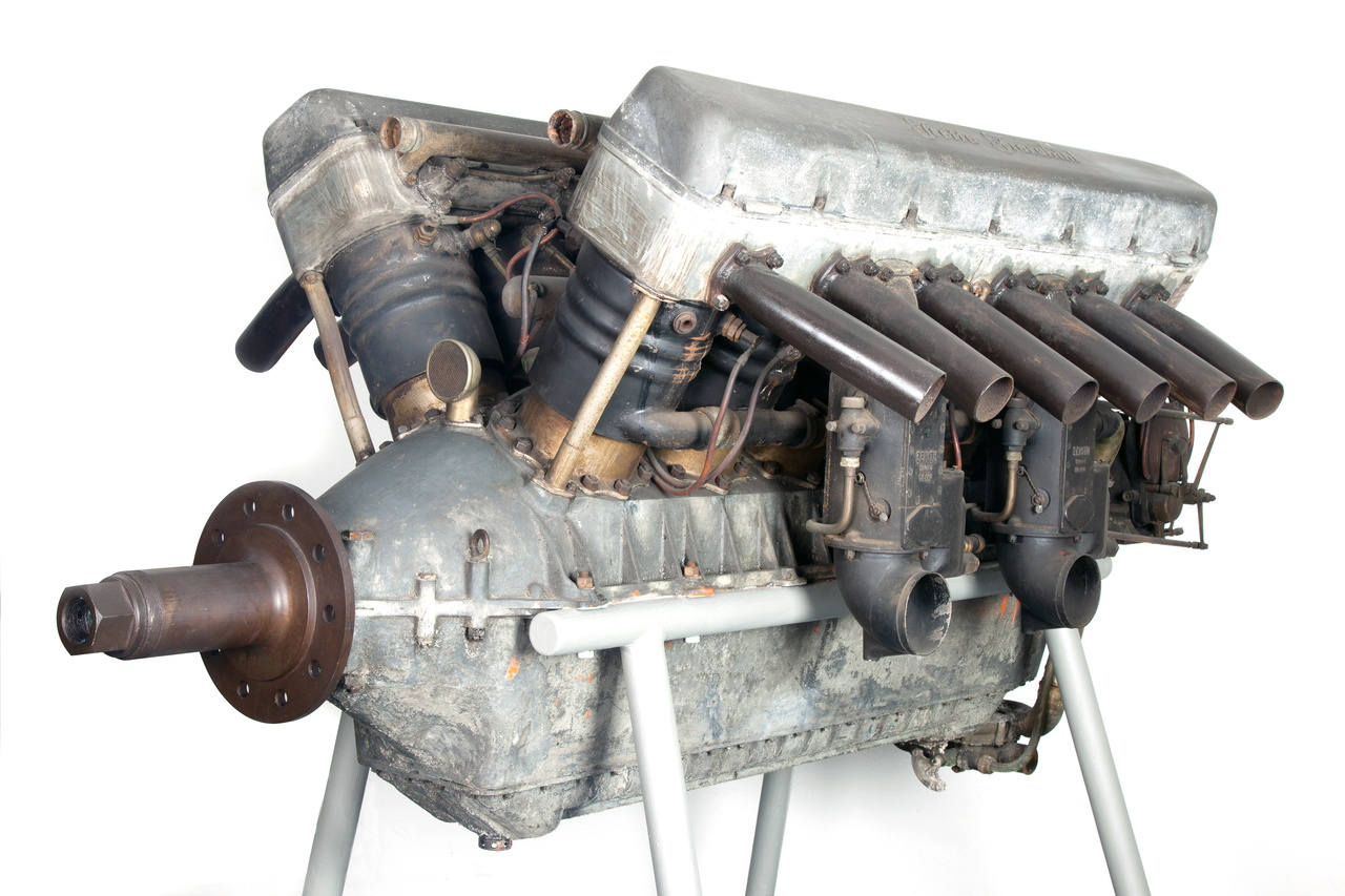 Motore a 12 cilindri in linea disposti a V di 60° d'ampiezza, raffreddato ad acqua. I cilindri sono in acciaio con una testata monoblocco in alluminio per ogni fila di cilindri; la testata prevede il passaggio della camicia dell'acqua sul cielo dei cilindri, in corrispondenza della sede delle valvole. La distribuzione è basata su quattro valvole per cilindro, comandate da un albero a camme. Il motore dispone di quattro carburatori Zenith, due per lato. Dei tubi sezionati sono posti in corrispondenza dell'uscita dei gas di scarico. L'accensione è ottenuta mediante due magneti posti nella parte posteriore del motore; i cavi elettrici sono sistemati nella parte interna della V dei cilindri. Notizie storico-critiche Al termine della Prima Guerra mondiale l'esigenza di motori con potenze sempre maggiori si fece pressante. Vista l'impossibilità tecnica, per il periodo, di sviluppare ulteriormente i motori rotativi e i motori a 6 cilindri in linea e constatati i problemi di affidabilità dei motori a 8 cilindri in linea, l'aumento della potenza fu risolto con l'aumento del numero dei cilindri disposti a V. Questa soluzione permise un deciso aumento della potenza, grazie ad una diminuzione del peso specifico: dato che nei motori in linea la maggior parte del peso era costituita dal basamento e dall'albero a gomiti, raddoppiando il numero il dei cilindri collegati allo stesso albero e alllo stesso basamento era possibile fornire potenze superiori ai 500 cavalli. Il motore Asso 500 fu il primo motore a 12 cilindri progettato dall'ingegnere Giustino Cattaneo e avviò una fortunata famiglia di motori derivati. Prodotto in grandi numeri, fu montato su vari modelli di aeroplani e idrovolanti: Caproni Ca.73 ter, Breda A.7 e C.C.20, Macchi M.24 bis, Cant 13 e 21, Savoia-Marchetti S.55 e S.59 bis.